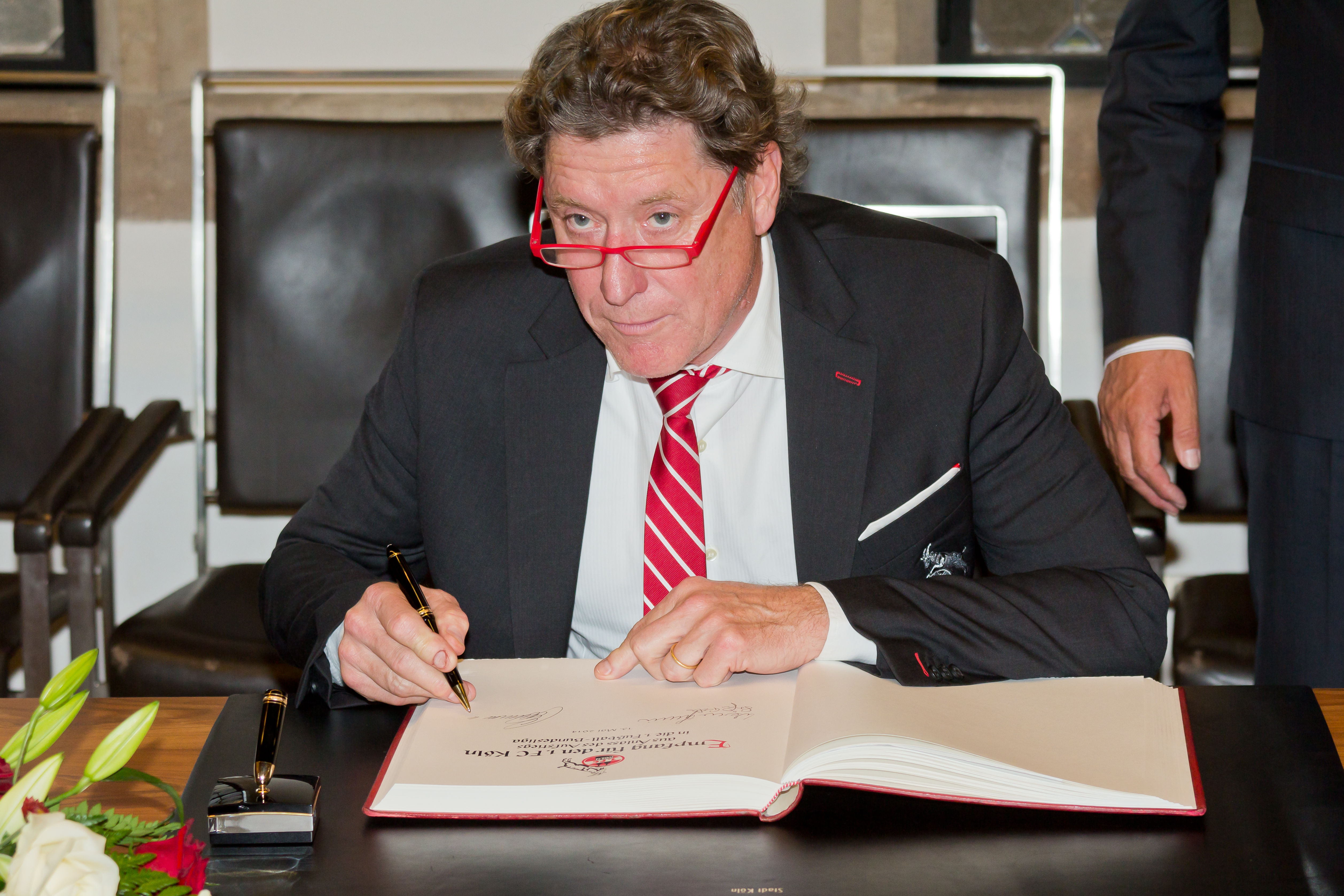 Empfang für den 1. FC Köln im Rathaus Harald Schumacher trägt sich in das Gästebuch der Stadt Köln ein